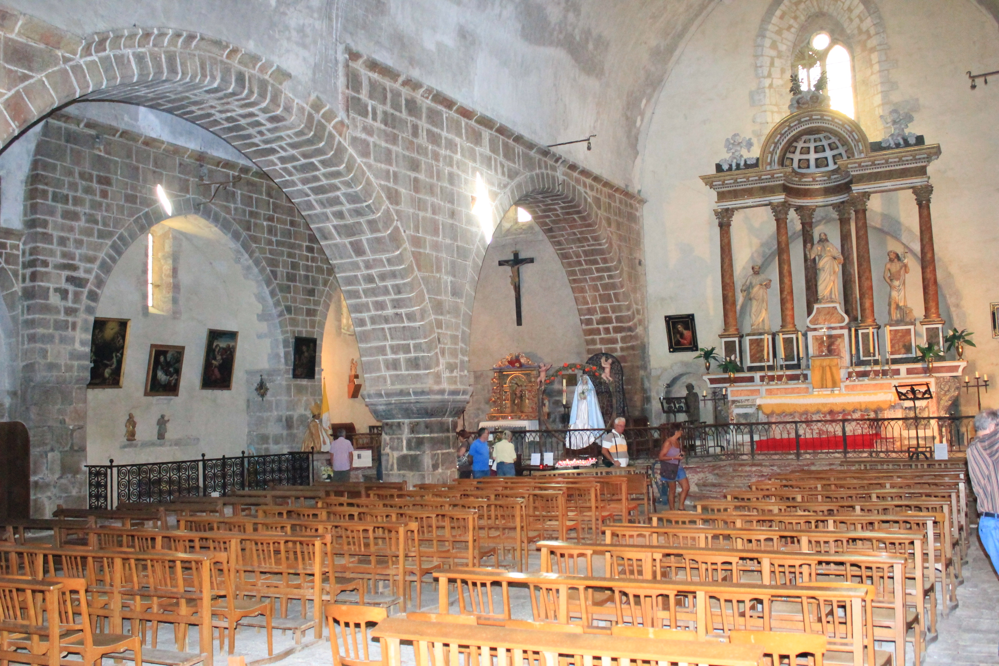 Saint-Pierre de Villefranche-de-Conflent Intérieur de l'église